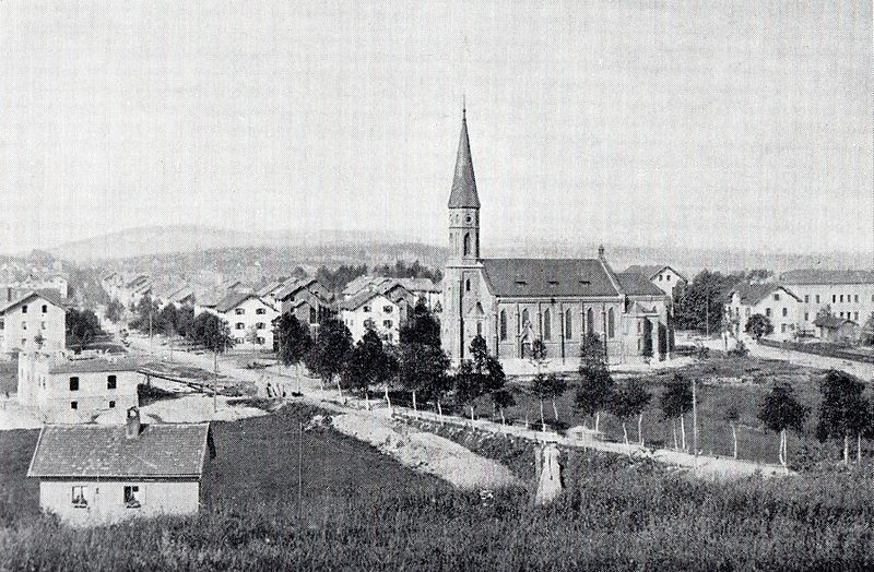 Penzberg mit alter Kirche St. Barbara, am 16. November 1944 durch Bomben zerstört. Blick vom Schachthügel aus